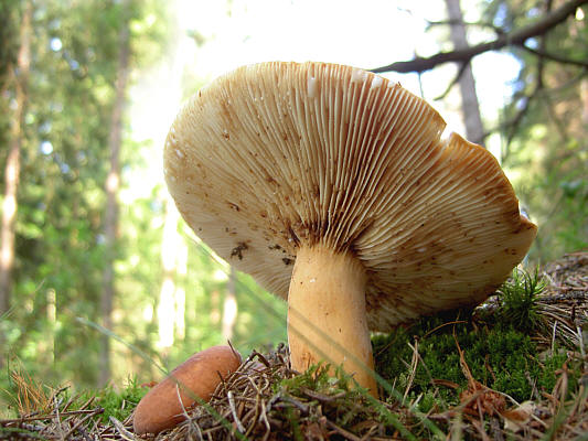 Brätling Fotograf: Walter J. Pilsak 2002 Copyright Status: GNU Freie Dokumentationslizenz